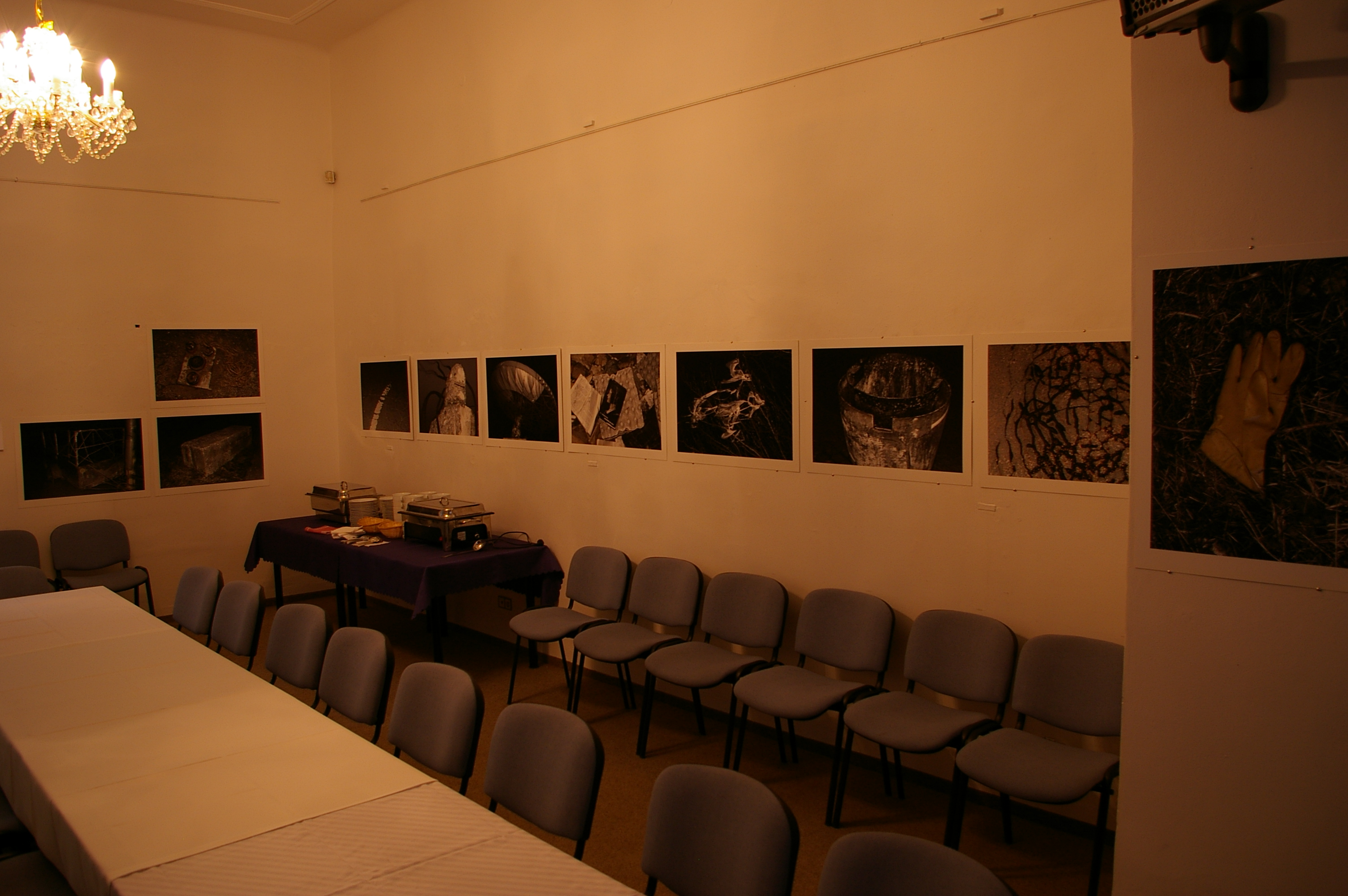 Mesiac fotografie Bratislava 2013